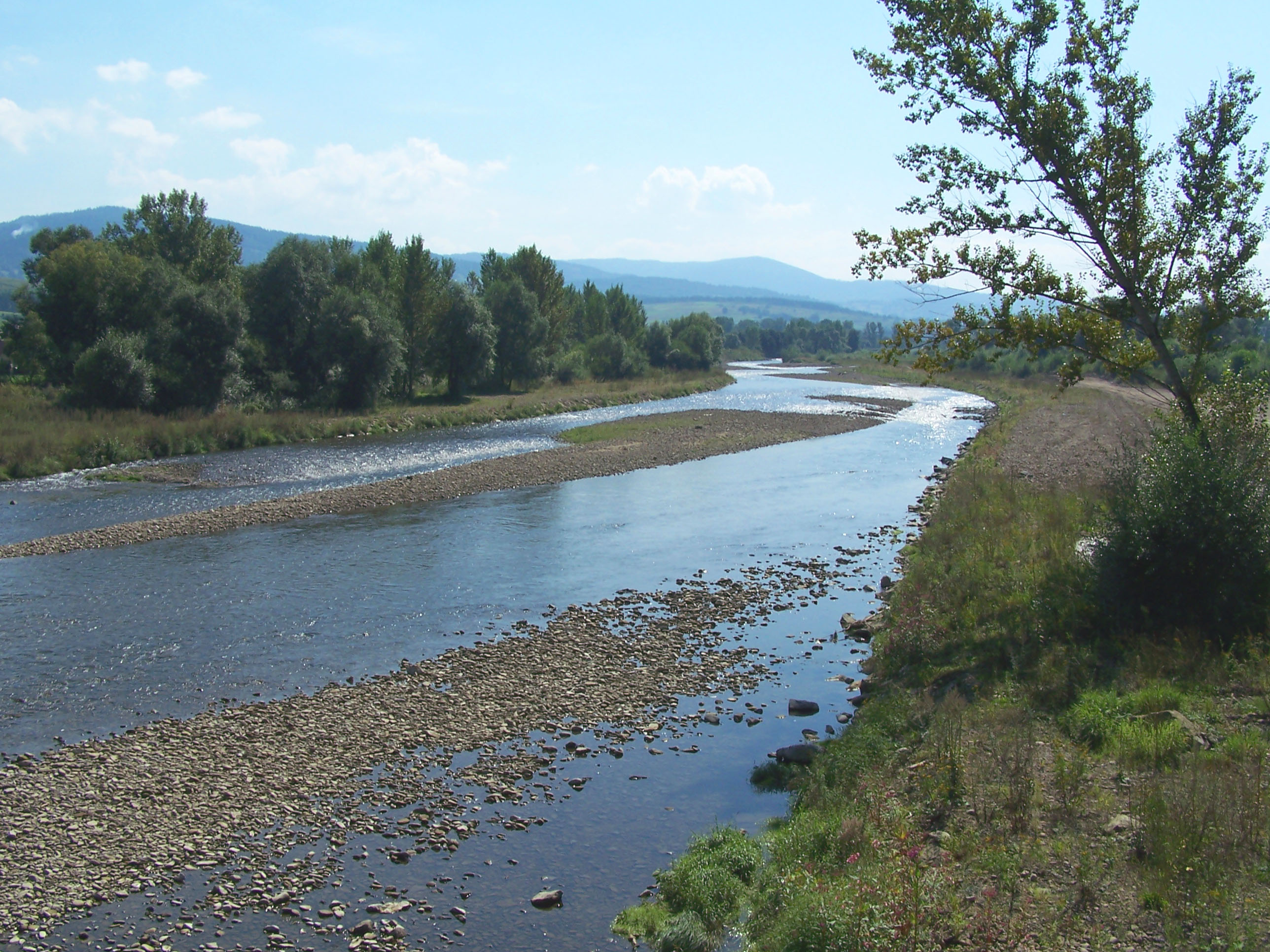 Soła River near Wieprz, Poland